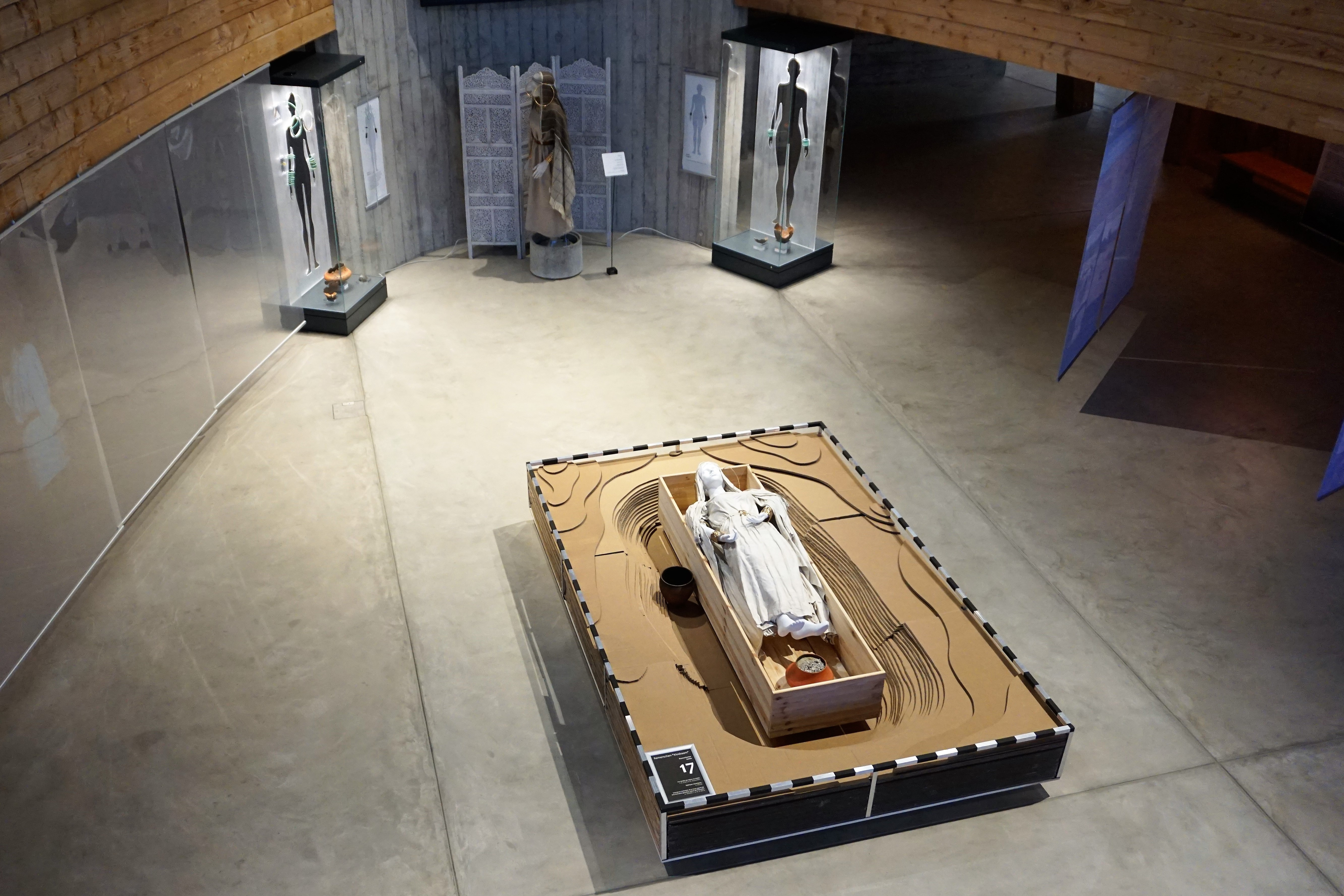 La dame de Schengen: Reconstitution de la tombe 17. Fosse sépulcrale avec évocation grandeur nature de l'inhumée, fac-similés des bijoux en métal et répliques céramiques.